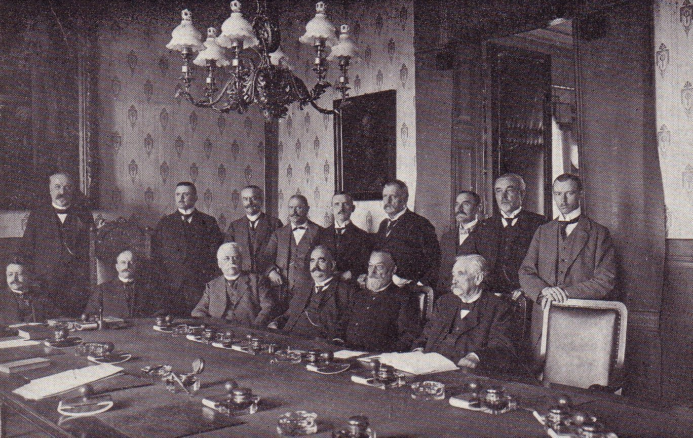 Fotografie des Magistrats von Tilsit am 7. September 1914. Stehend (von links nach rechts): Kgl. Baurat Bruhnke; Stadträte Teschner, Schmidt, Deskau, Quentin, Schwenner, Mehl, Gebauer und Wiesner. Sitzend: Baumeister Rohde, Stadträte Dedelet und Lippold, Oberbürgermeister Pohl, Stadträte Riemann und Wanovius. Tilsit wurde am 12. September 1914 von der russischen Armee unter Rennenkampf besetzt.